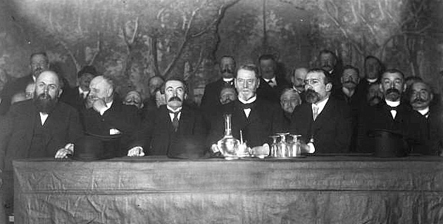 15-2-1914, Le Havre, salle Franklin, réunion politique organisée par la Fédération des gauches, Mr Barthou, Mr Siegfried adjoint au maire, Mr Briand, Mr Chéron (photographie de presse)